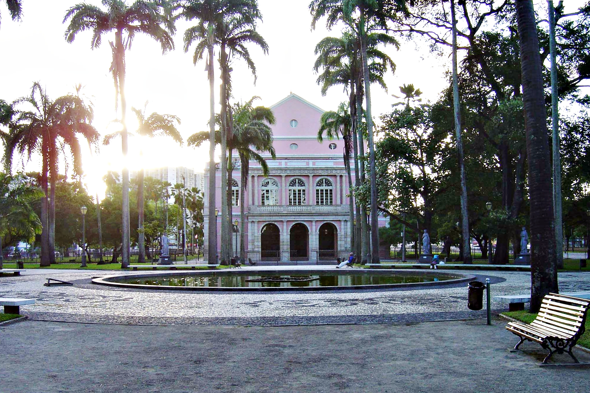 Teatro Santa Isabel. Recife, Pernambuco, Brasil.